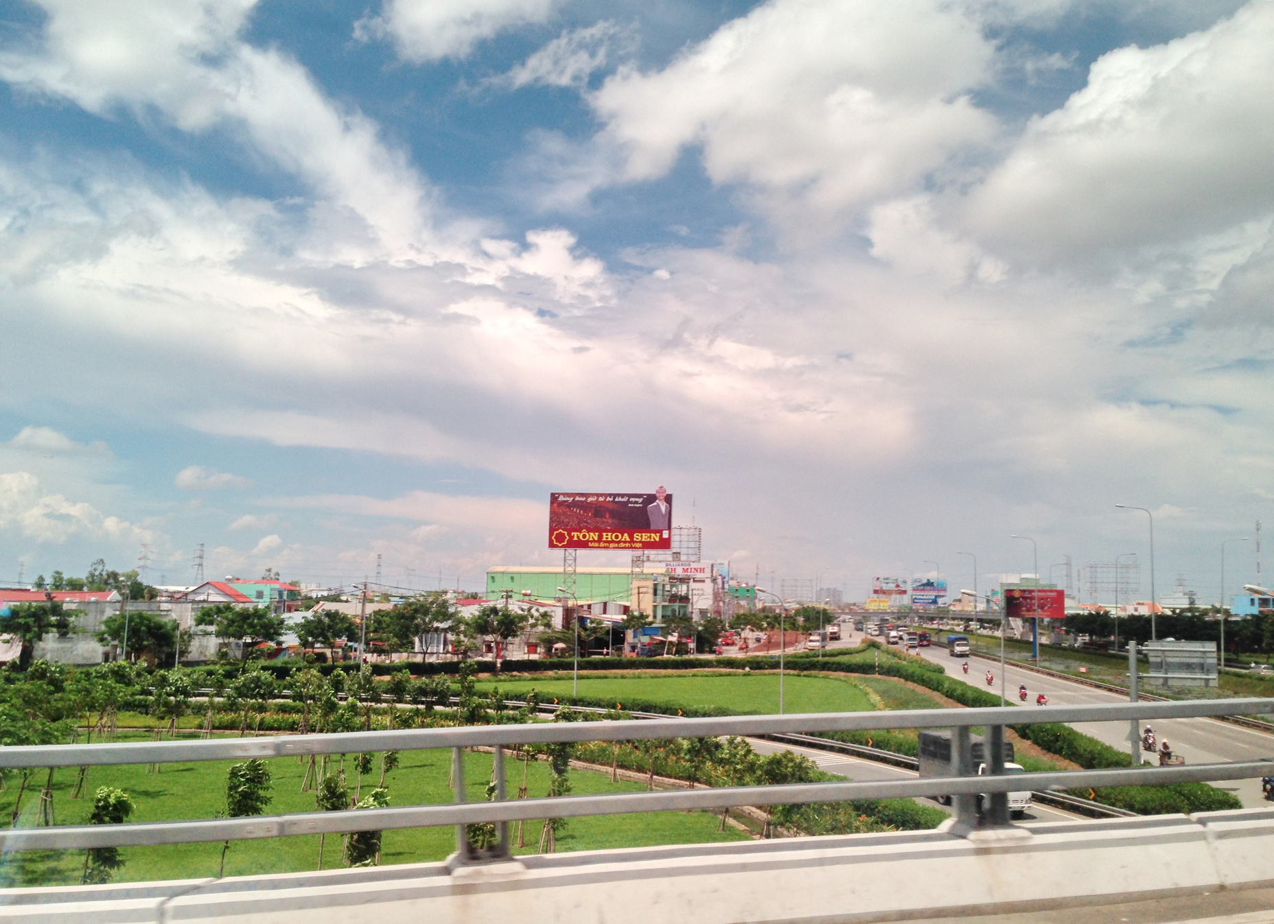 Ql 1A, Tân Kiên Bình chánh, Hcmvn